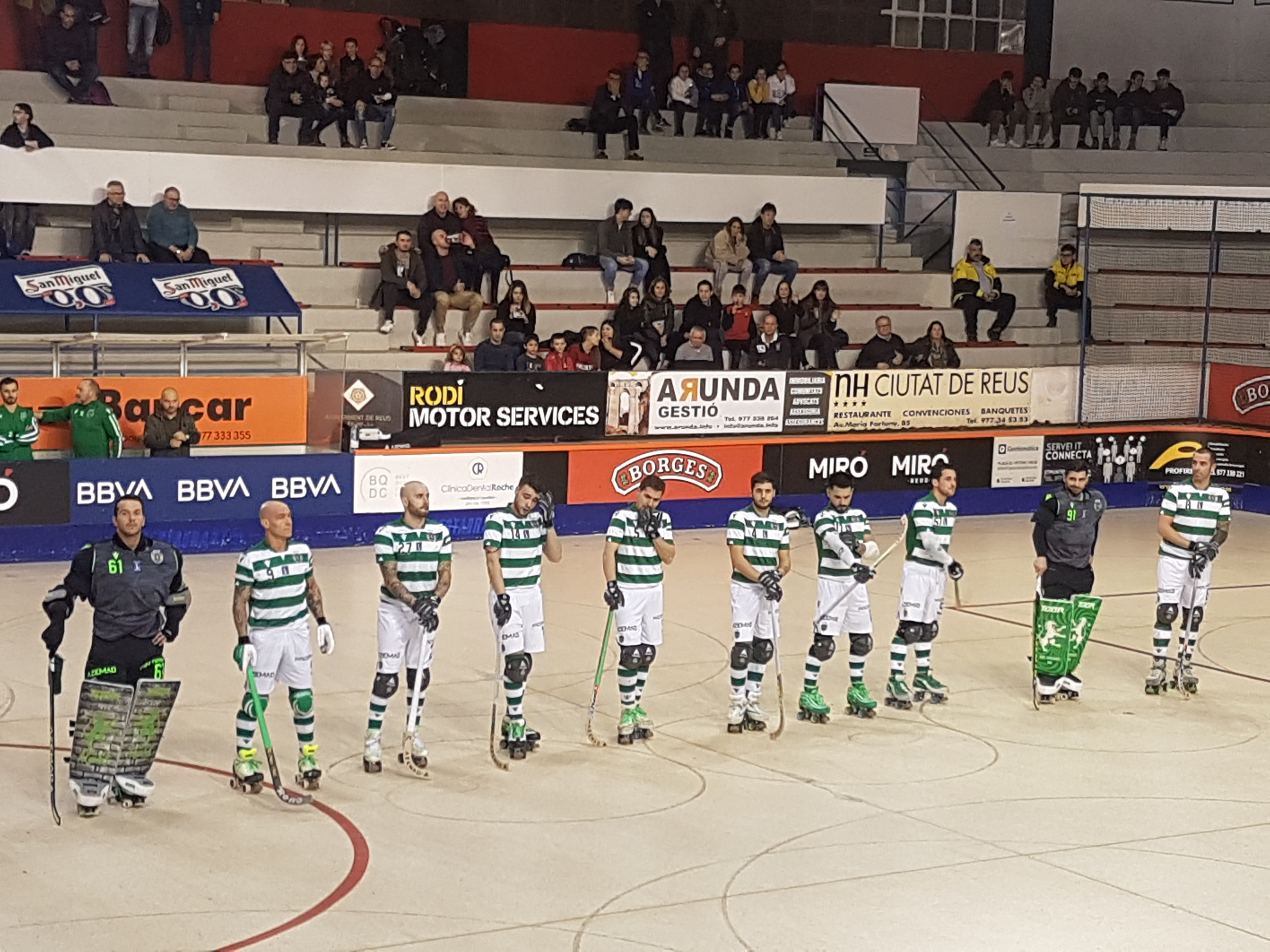 Plantilla Sporting Clube de Portugal